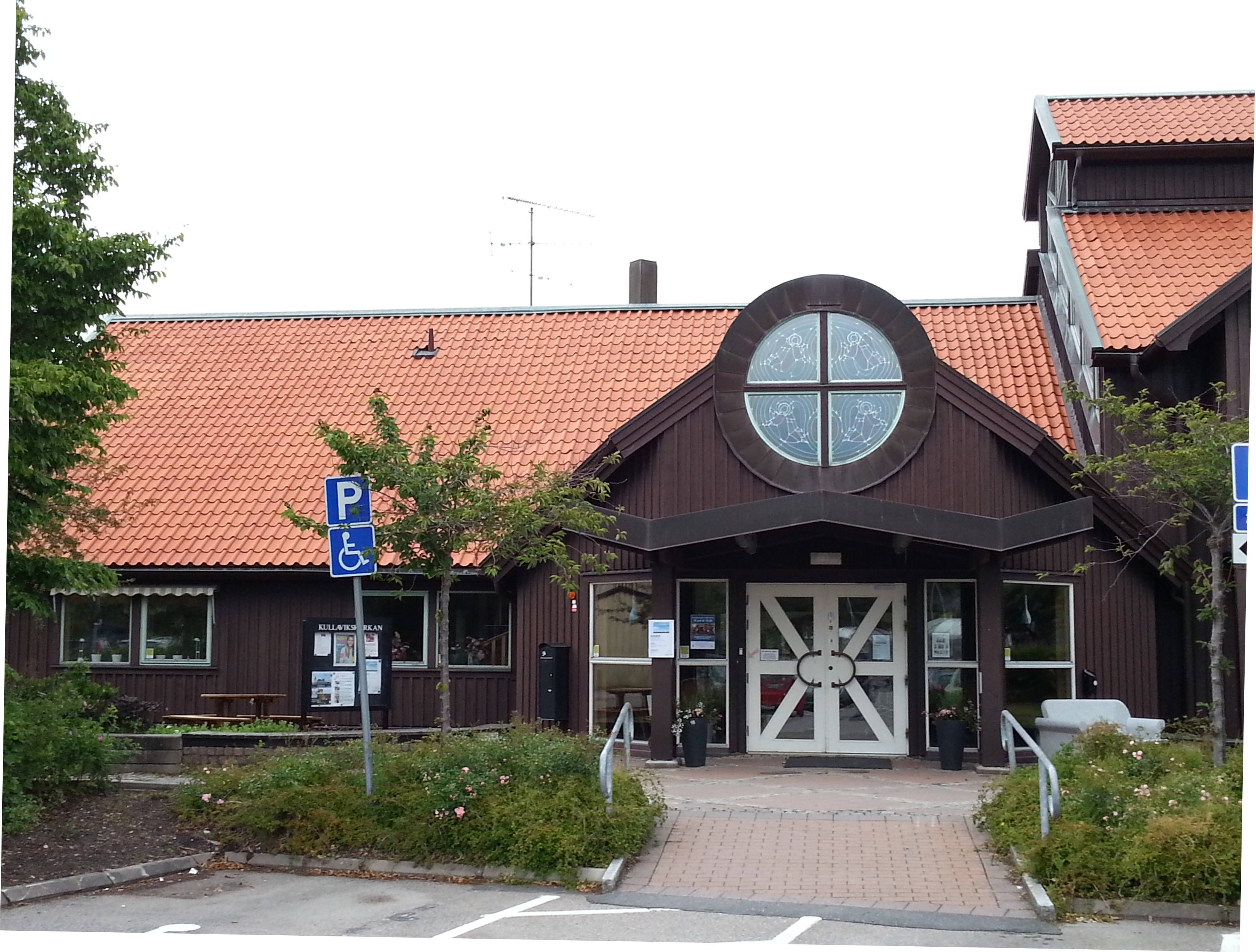 Kullavikskyrkans entré